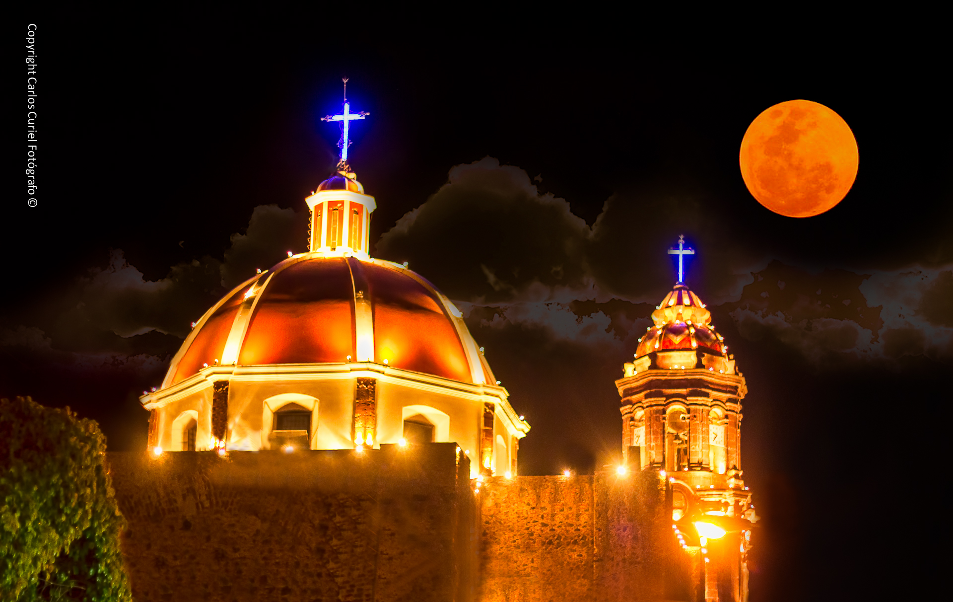 Es una verdadera obra de arte de la arquitectura local, que data del siglo XVIII. Su fachada es de cantera rosa; su portada se muestra cuatro nichos, ubicados dos a cada lado de la entrada, con esculturas de San Pedro, San Pablo, Santa Mónica y San Agustín. Al centro, arriba, exhibe un excelente altorrelieve de la Virgen de Guadalupe. Este templo que está dedicado a la patrona de La Barca, se comenzó a construir en 1780 por iniciativa de los padres agustinos, terminándose en 1797. En 1937, se reconstruyó la torre del campanario y se cubrió de azulejos la cúpula, dándole un atractivo especial.